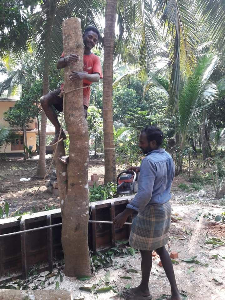 മരങ്ങളിലെ പുനർ യൗവന പ്രക്രിയ കഴിഞ്ഞ ഒരു മാവ്.